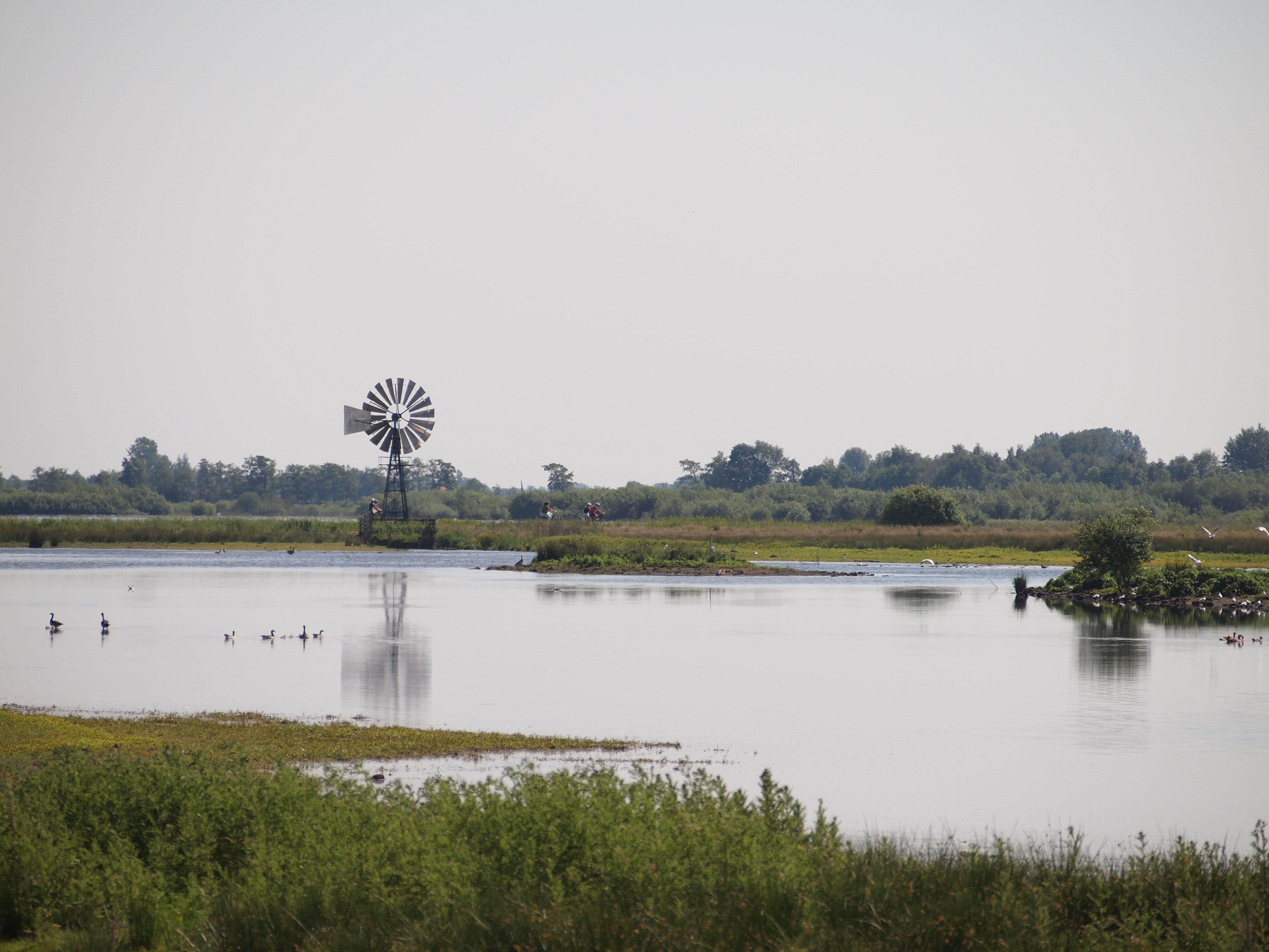 Jan Durks Polder.Alde Feanen This is a photo or sound file made in De Alde Feanen National Park in the Netherlands, with the main subject of the file in the category: landscapes